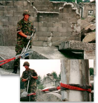 Mit freundlichem Dank an die Mehrzweckzughersteller Firma Habegger in Thun, Urheberrecht telefonisch abgesprochen. Zusage von Peter Habegger, CEO Habegger. Auf die schriftliche Zusage warte ich noch. Das Bild fällt unter die GNU-Freie Dokumentationslizenz. 13 20:15, 2. Nov 2004 (CET)